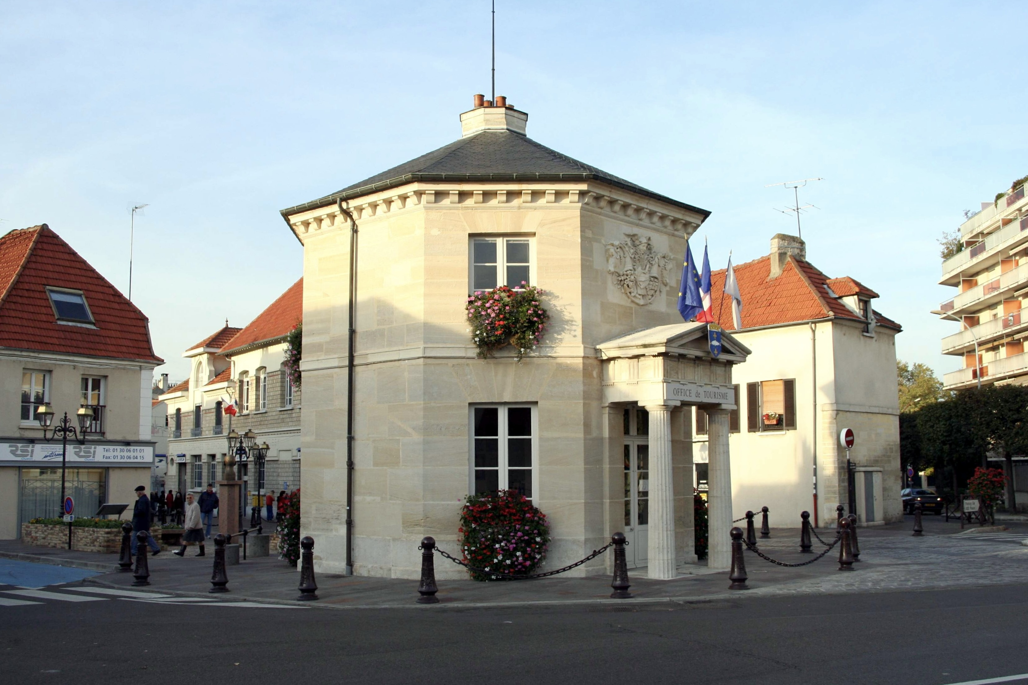 Pavillon d'octroi (Office de tourisme) à Poissy - Yvelines (France)